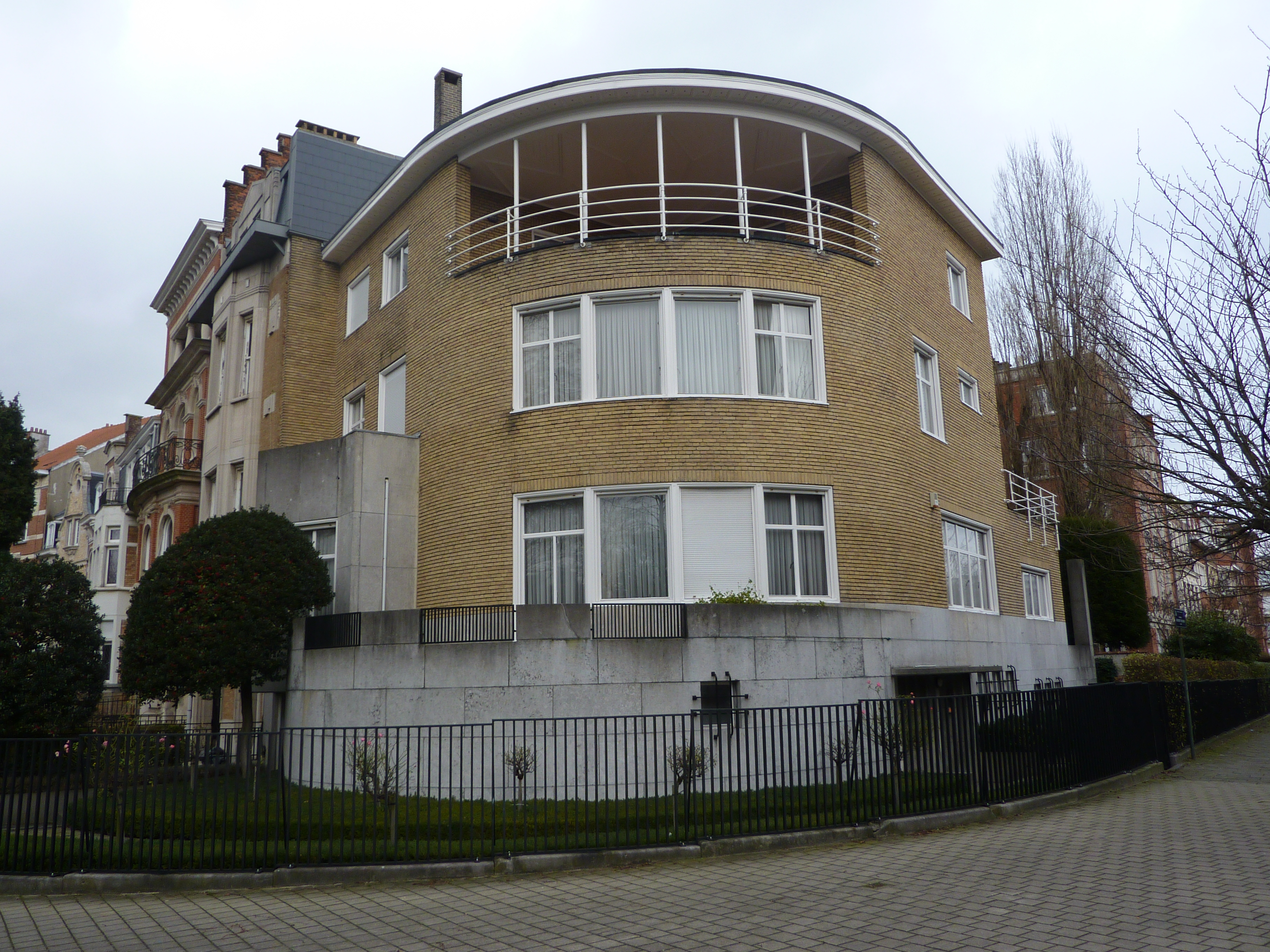 Square Vergote numéro 16 à Schaerbeek, Bruxelles, Belgique.